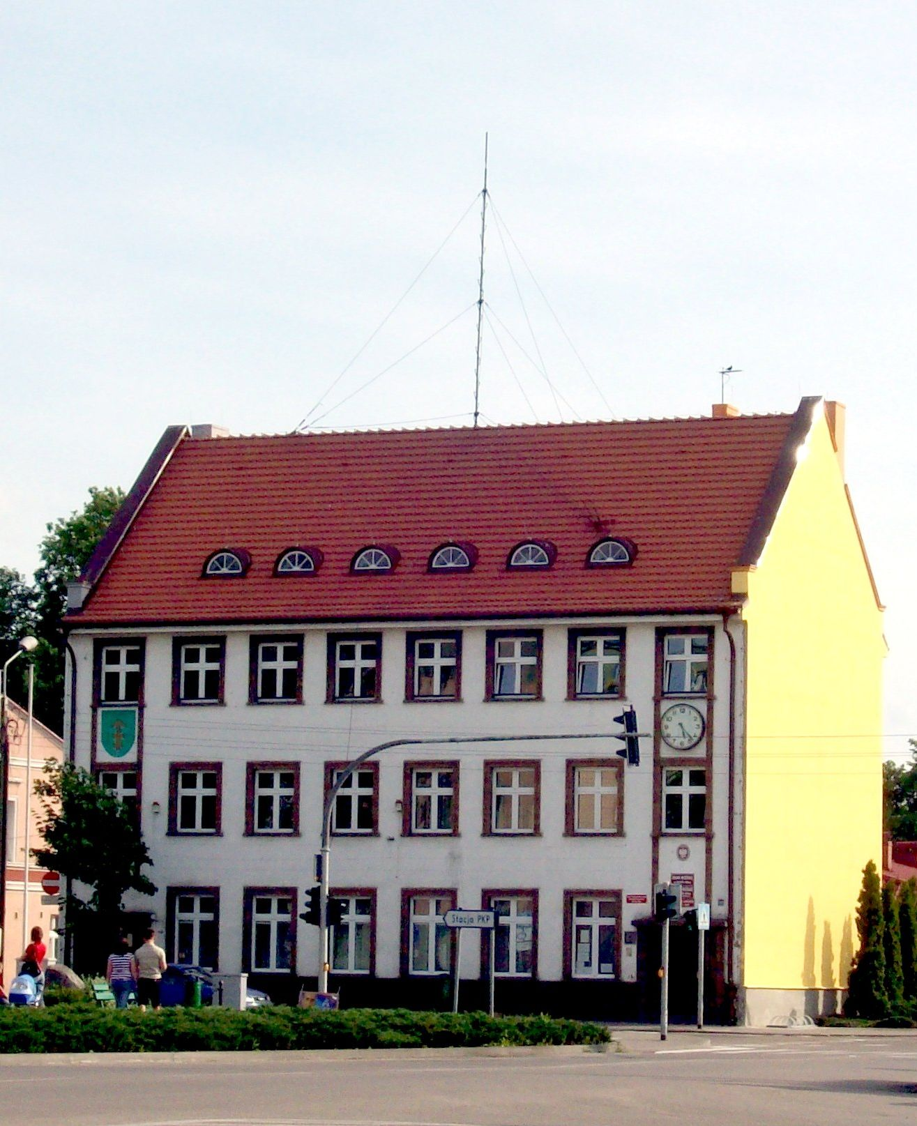 Ayuntamiento de Krzyż.